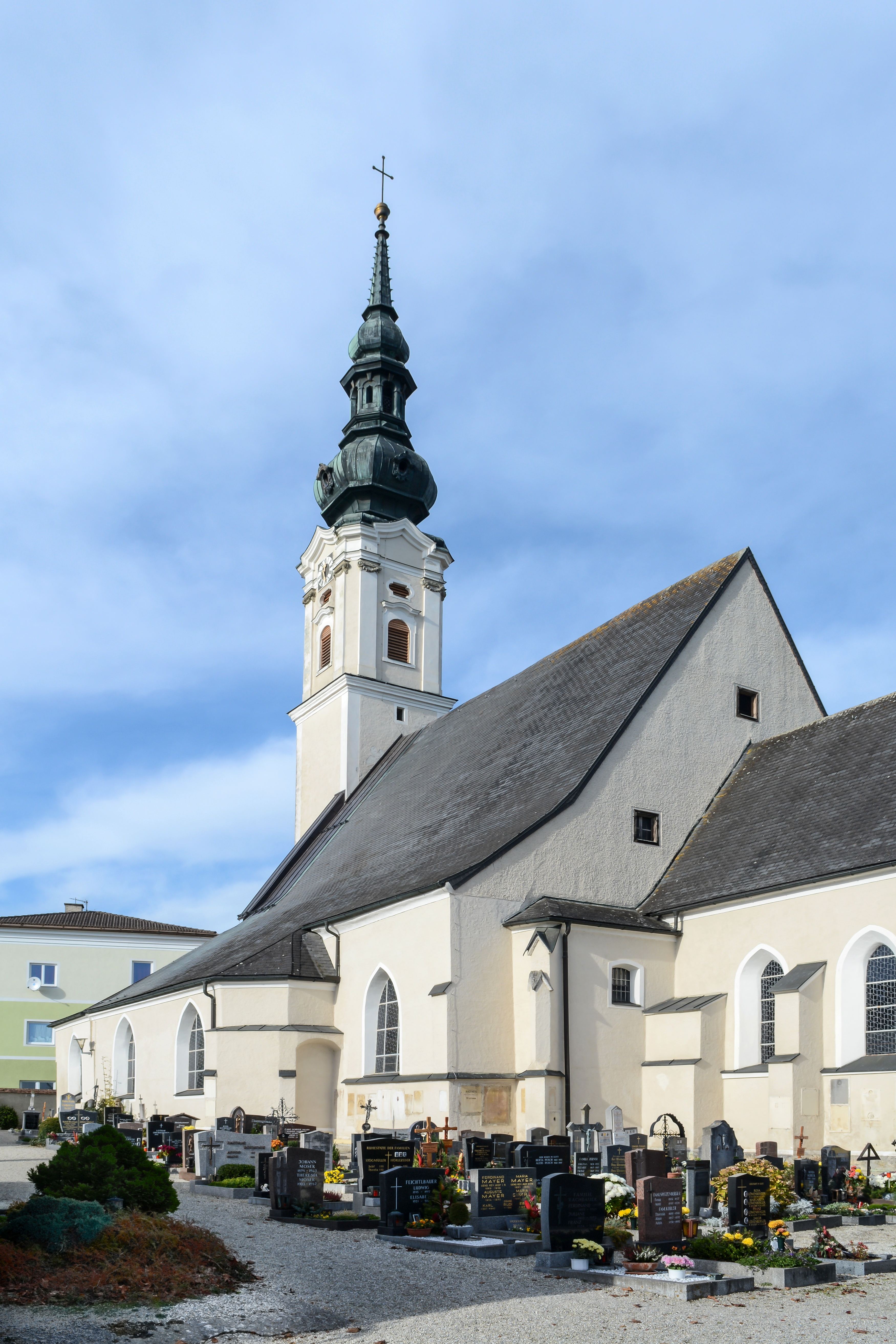 Kath. Pfarrkirche Hl. Abendmahl des Herrn und Friedhof